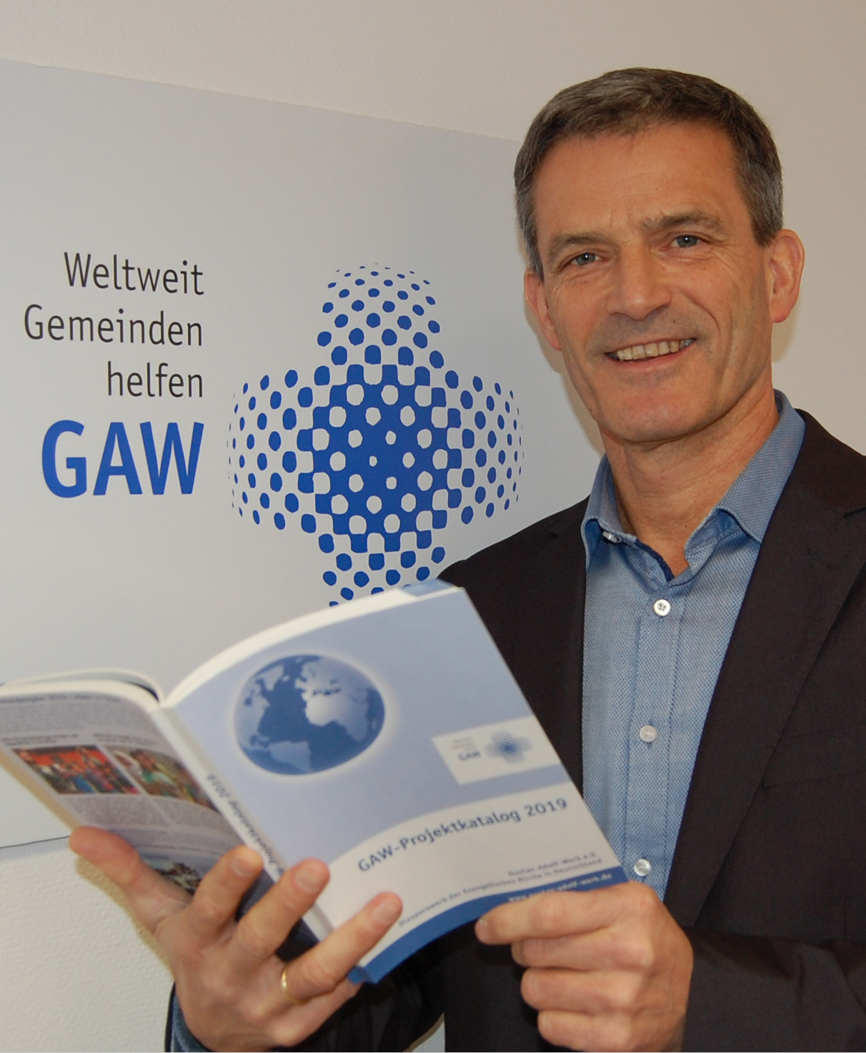 Generalsekretär des GAW, Pfarrer Enno Haaks, bei der Vorstellung des GAW-Projektkatalogs 2019, der 121 Projekte in rund 50 Kirchen umfasst.